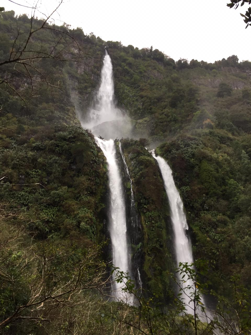 Vista inferior del Salto El Calzoncillo, en ella se puede observar vegetación típica de una selva valdiviana.